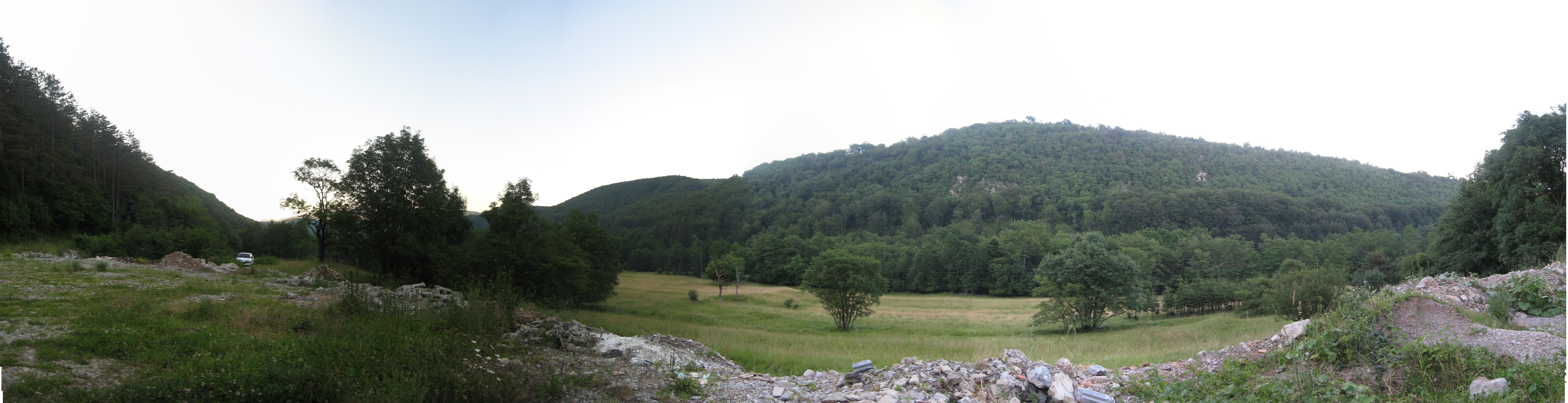 Klana, Croatia